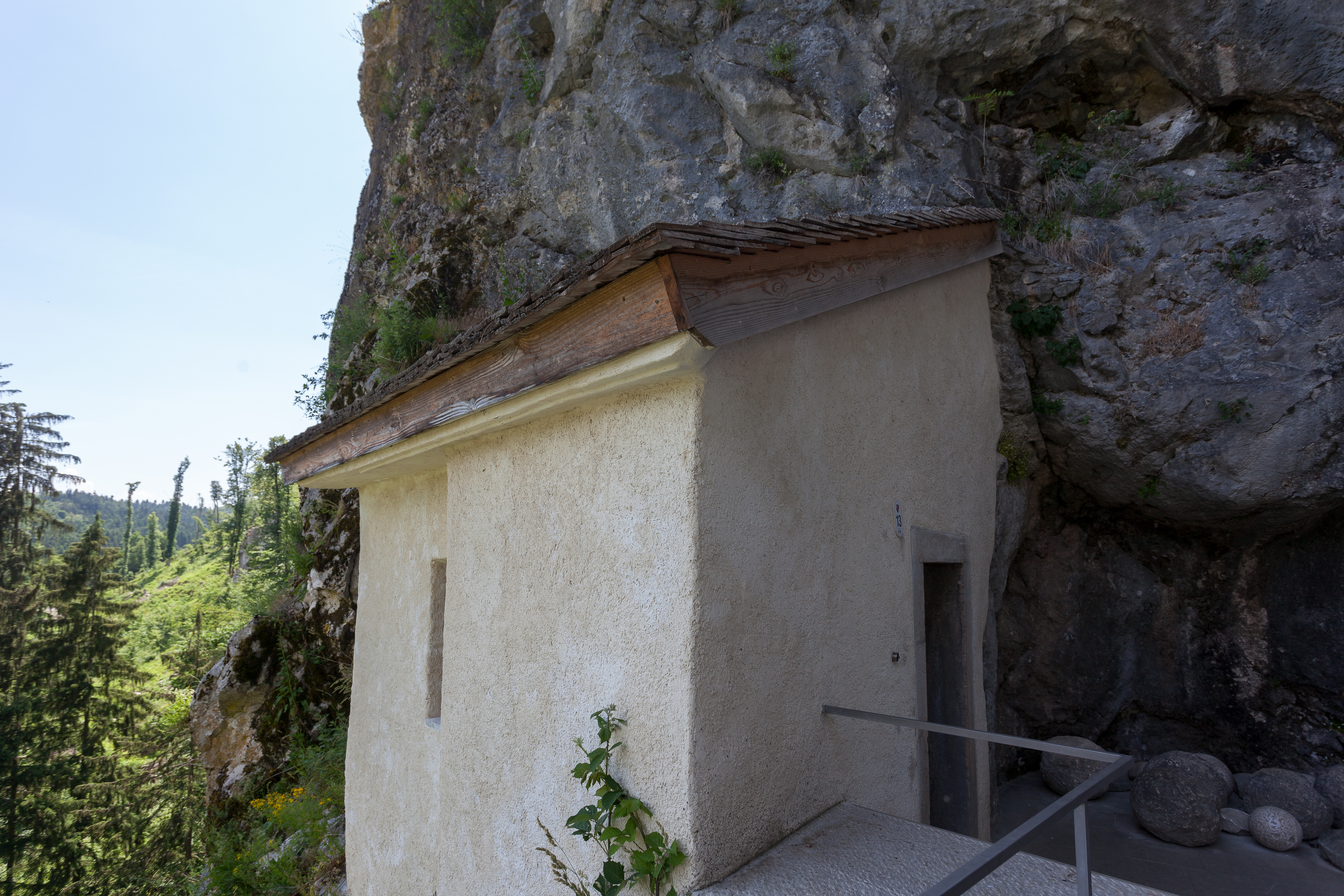 Toilette auf der Höhlenburg Predjama in der angeblich Erasmus von Luegg getötet wurde